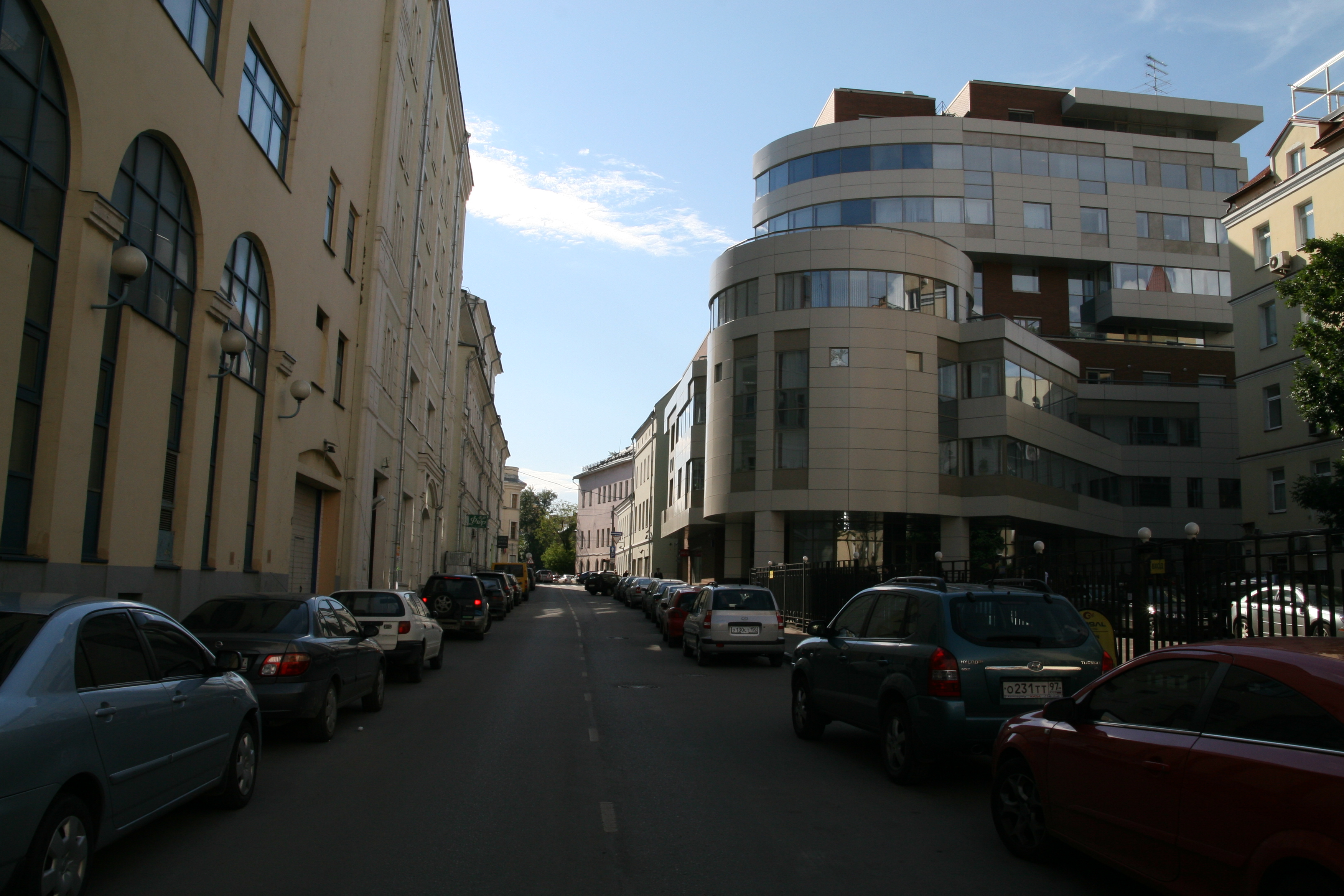 Ащеулов переулок в Москве